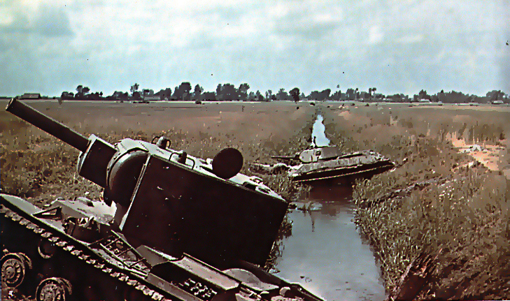 Новейшие танки КВ2 и Т34 в противотанковом эскарпе